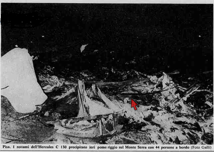 Foto dei rottami del C-130 Hercules a Monte Serra - Pisa, precipitato il 3 marzo 1977